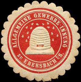 Sealing stamp Title: Allgemeine Gewerbe - Innung zu Ebersbach i. S. Description: rot, weiß, geprägt Place: Ebersbach / Sachsen size: 4 cm